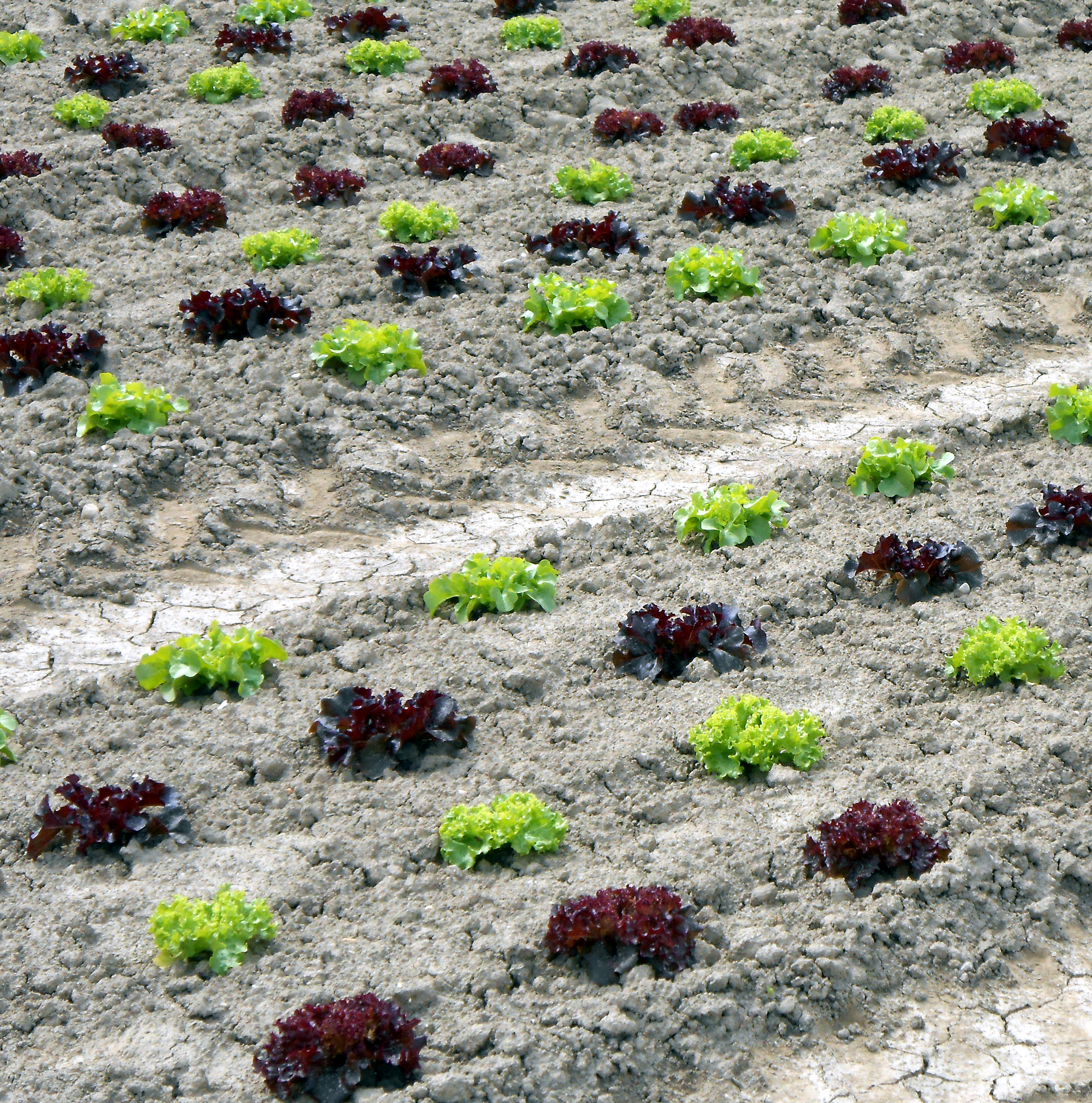 Lollo Rosso Lollo Bianco